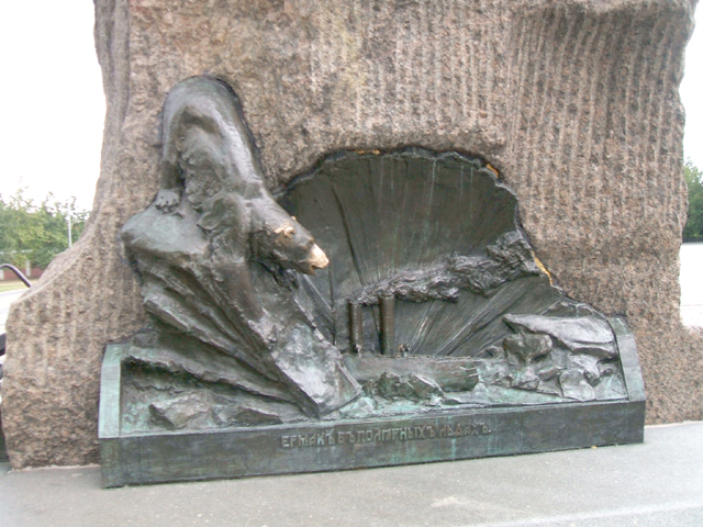 La bareliefo. La arktika navigado de glacirompilo «Jermak».